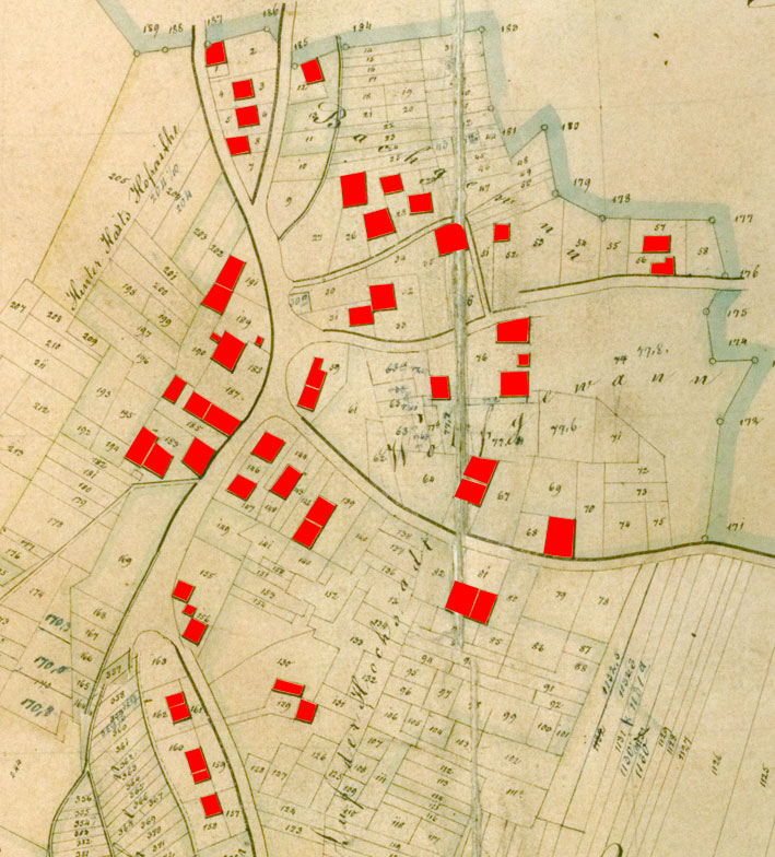 Grundrissskizze der Wildung Pferdsbach in Büdingen